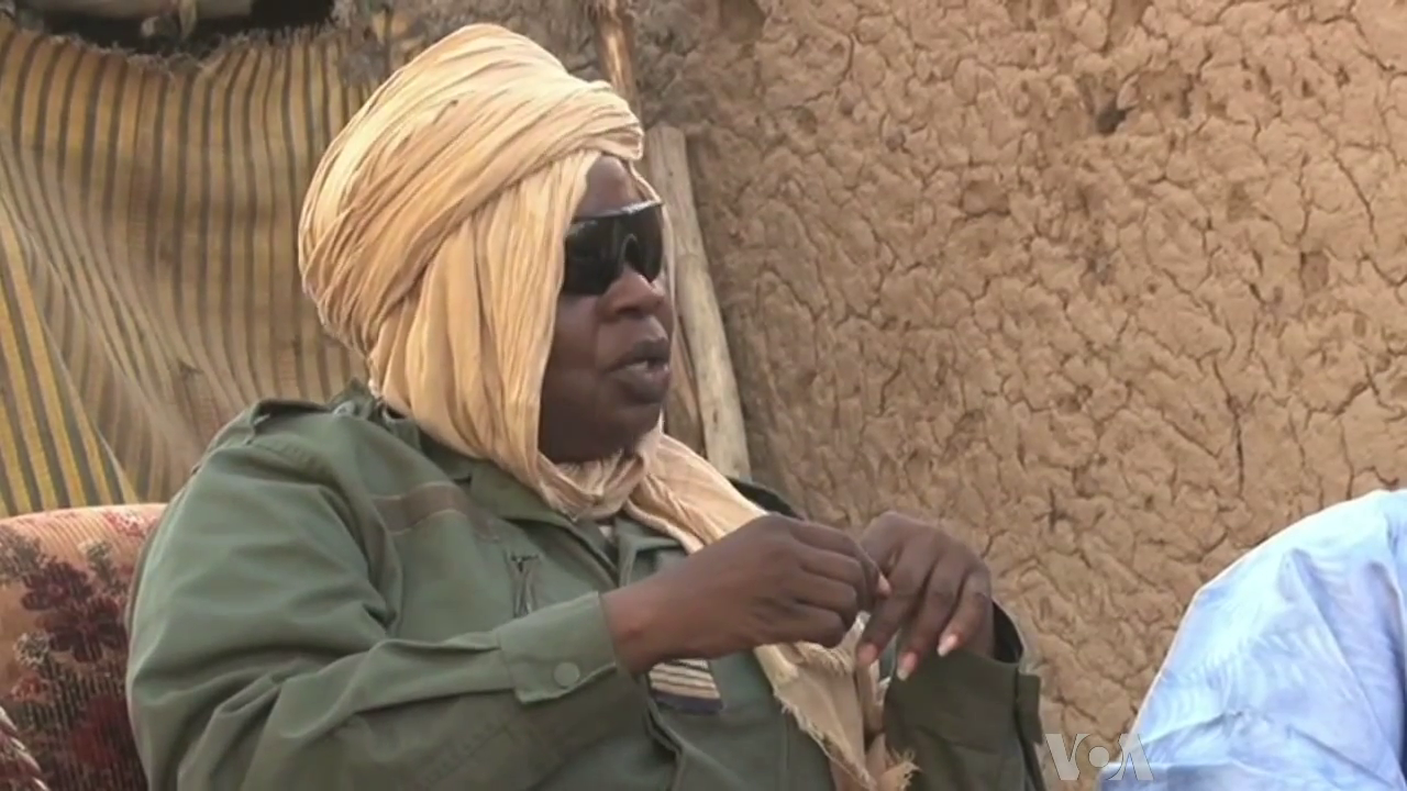 Lieutenant-Colonel (d'aviation) Néma Sagara, à Gao, en mars/avril 2013